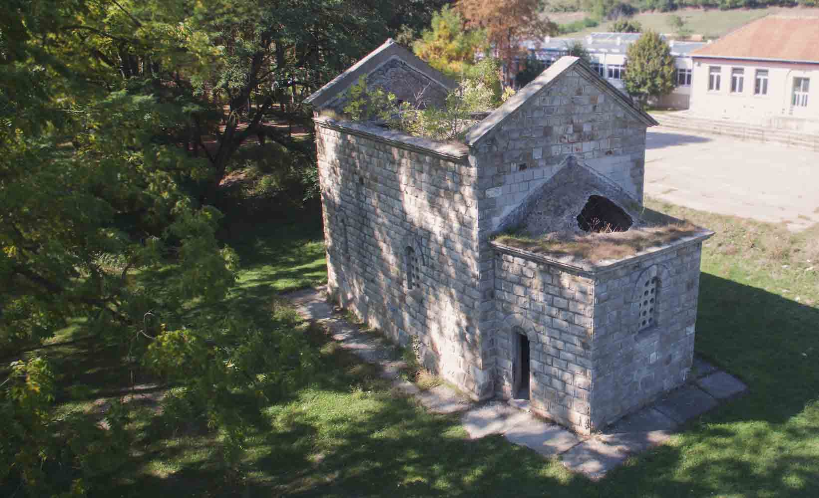 Gërmadhat e Kishës “Latine / Katolike, Sakse”, “Shën Pjetri”